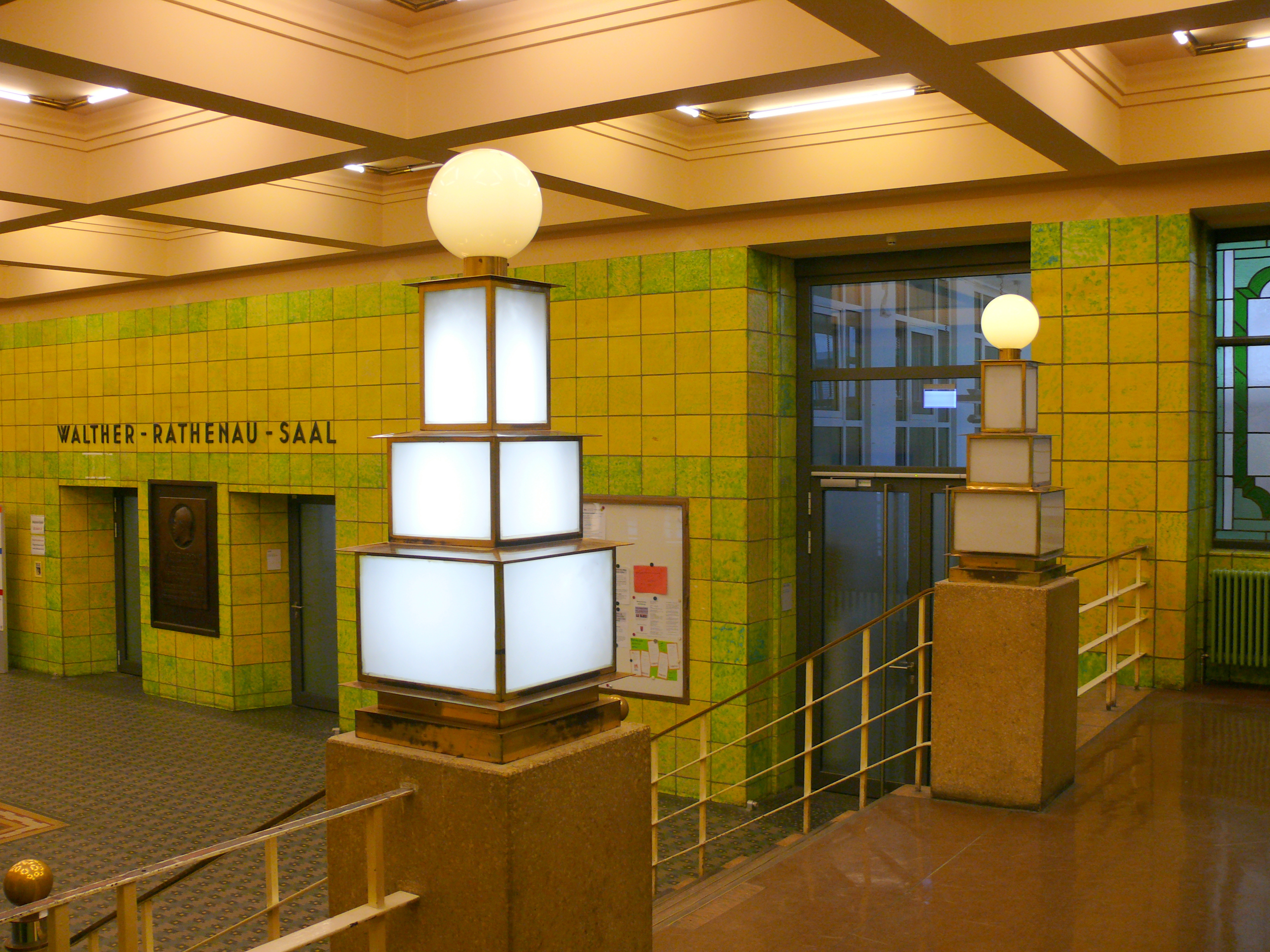 Rathaus Wedding Eingangshalle Leuchten